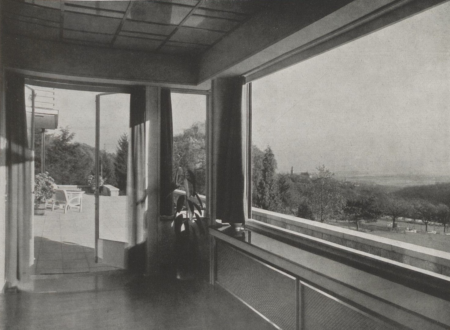 Professor Dr. Peter Behrens: Villa Gans in Kronberg. Veranda. Blick zur Terrasse.